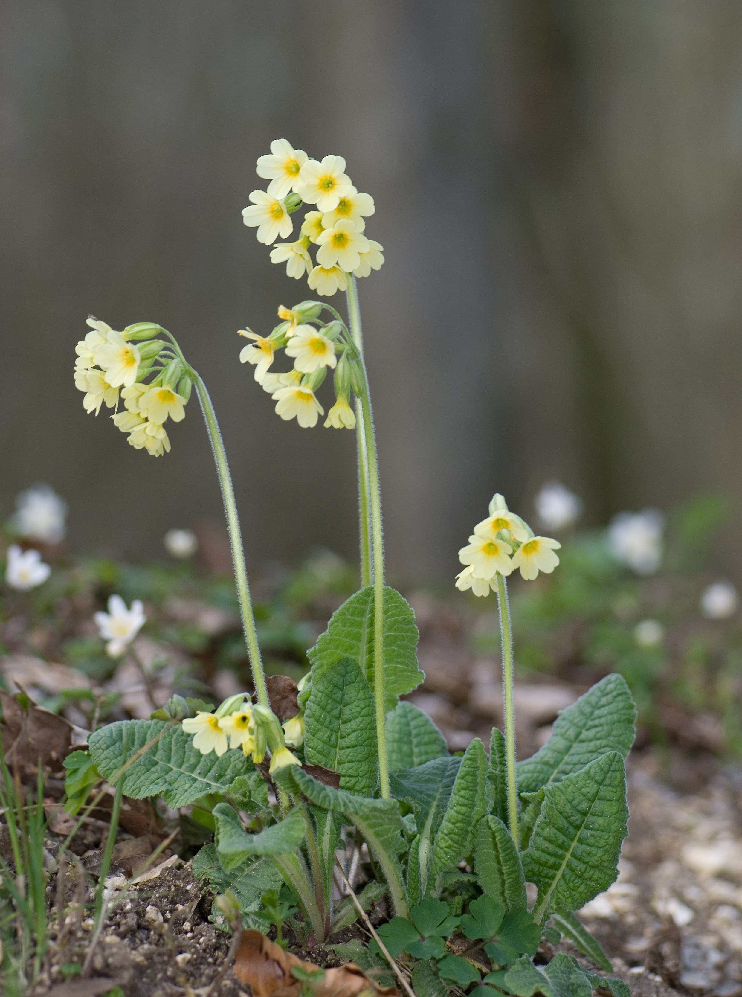 Primula elatior en Meuse (Forêt domaniale de Koeur-la-Grande).